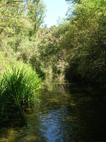 Río Mundo a su paso por la pedanía de Mesones (Molinicos, Albacete, Sierra de Alcaraz, )